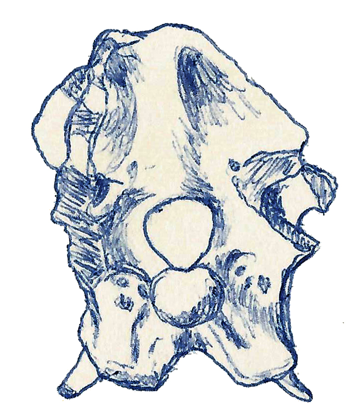 Illustration of a fossil of Itemirus